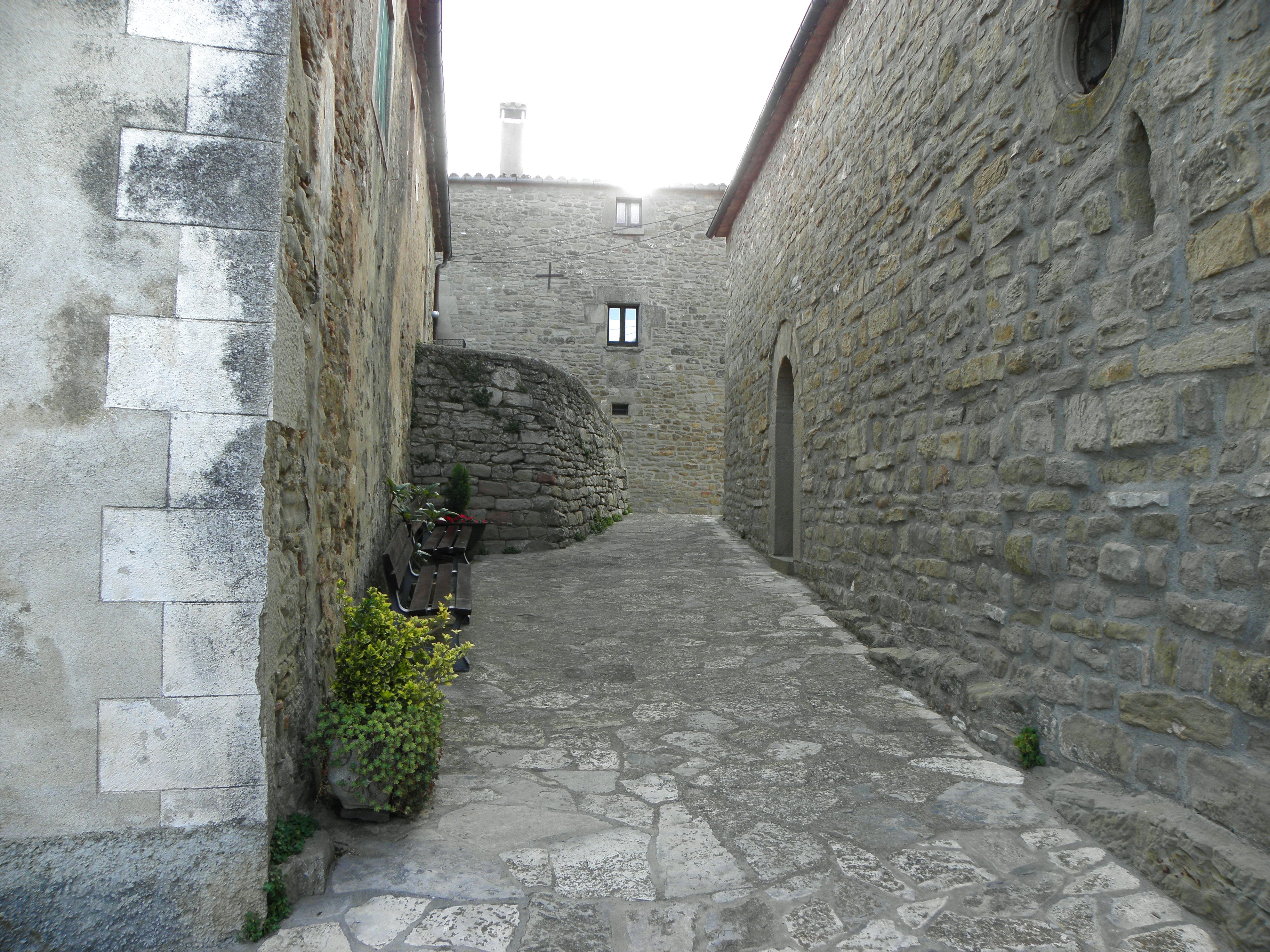 A l'esquerra, la façana sud de l'església de Sant Ponç, a Prades de la Molsoa (La Molsosa, Solsonès) amb el portal d'accès al recinte.